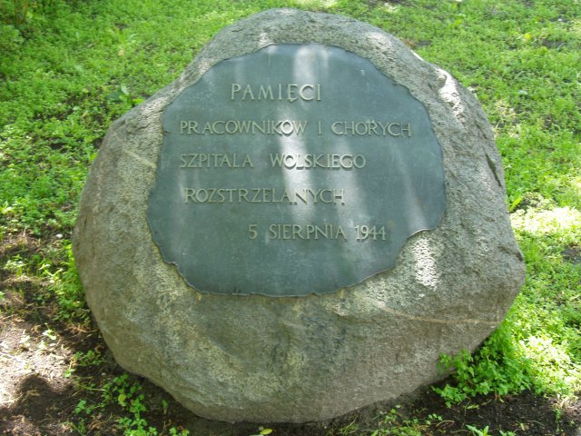 Rejon Instytutu Gruźlicy i Chorób Płuc, ul. Płocka 26 w Warszawie (fot Zu)